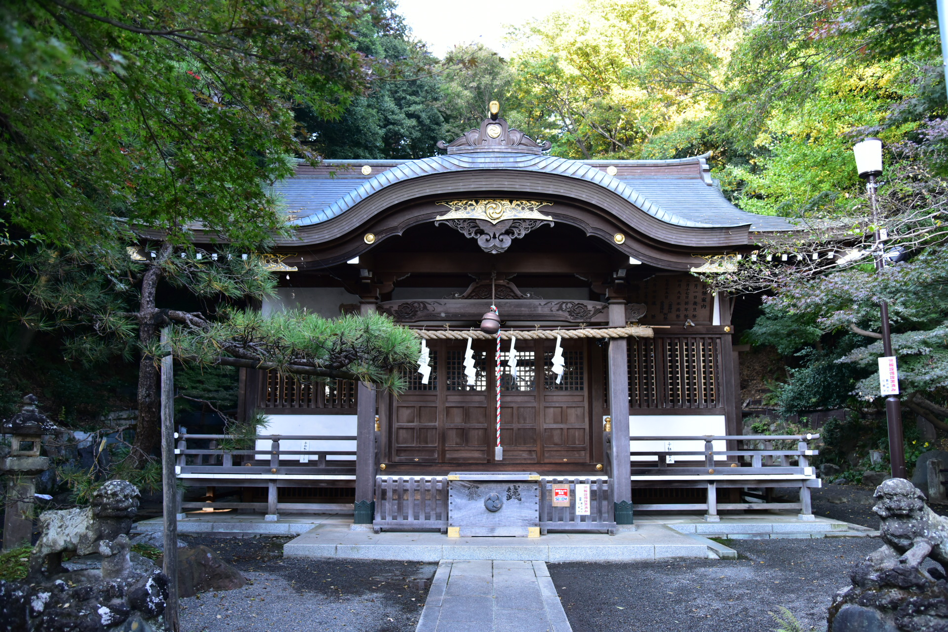 貫井神社拝殿